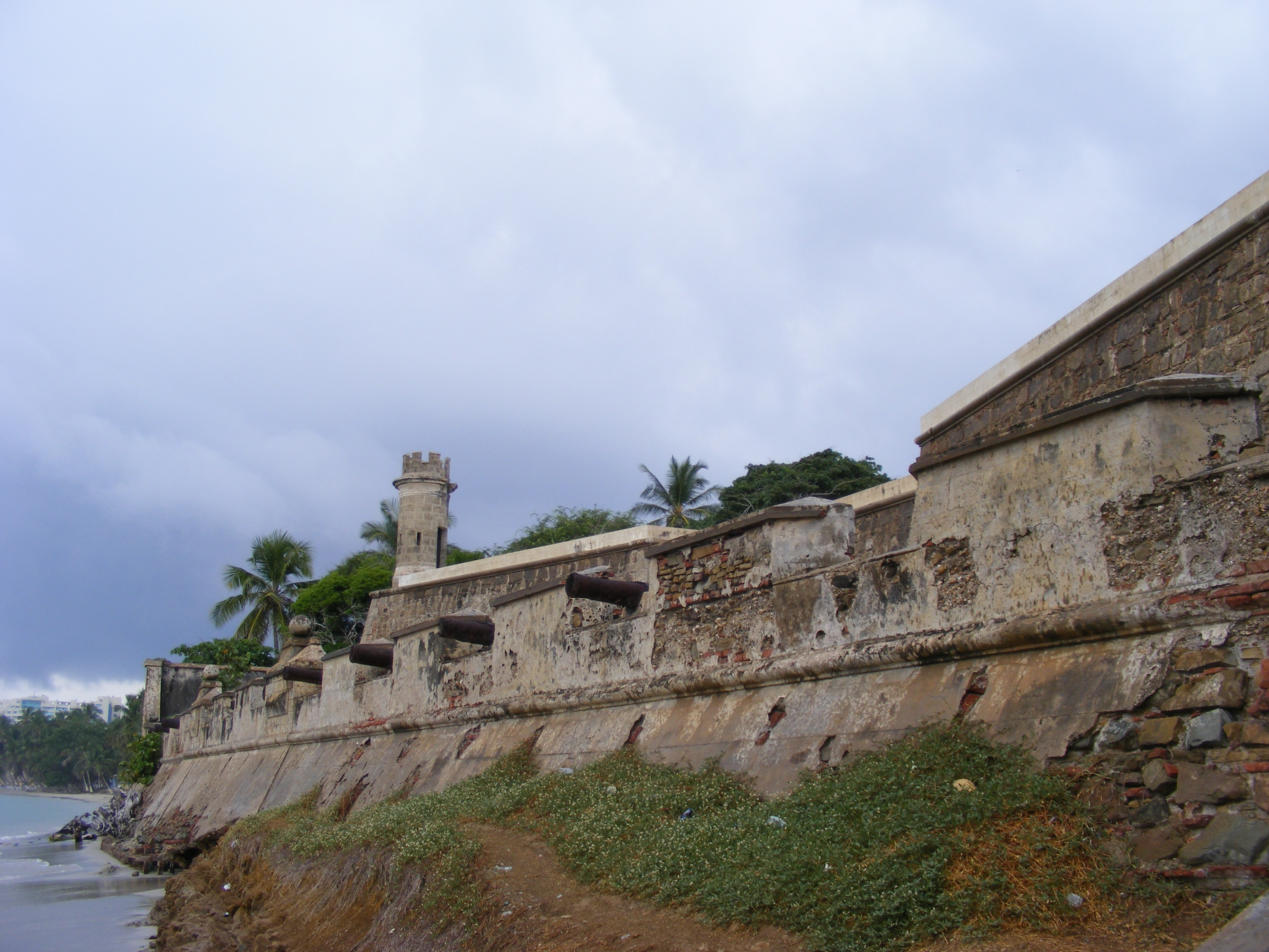 Fortin de Pampatar, Isla de Margarita, Venezuela